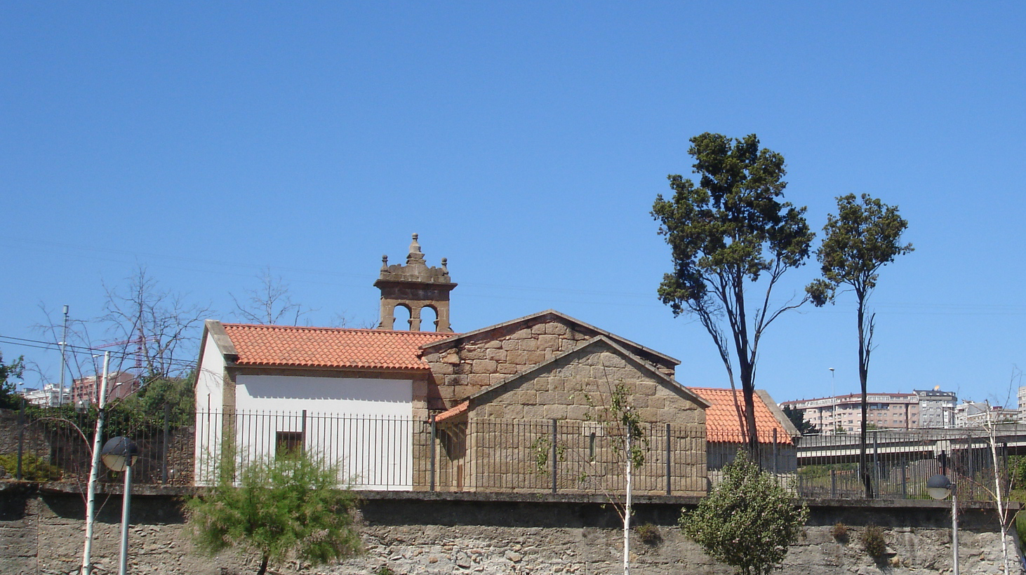 (Foto recortada)Parte traseira da Capela de Santa María de Oza (A Coruña).